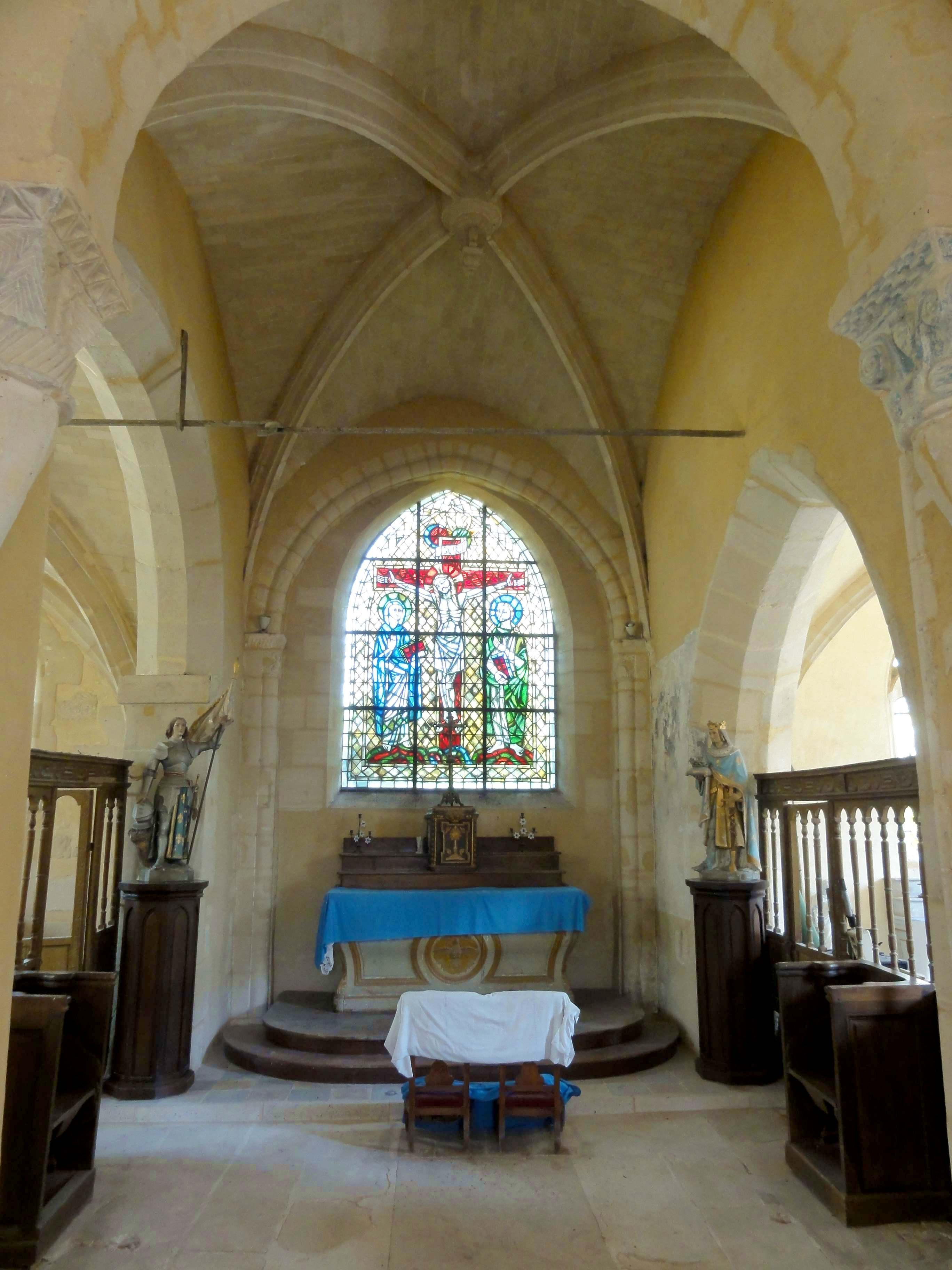 Intérieur de l'église (voir titre).